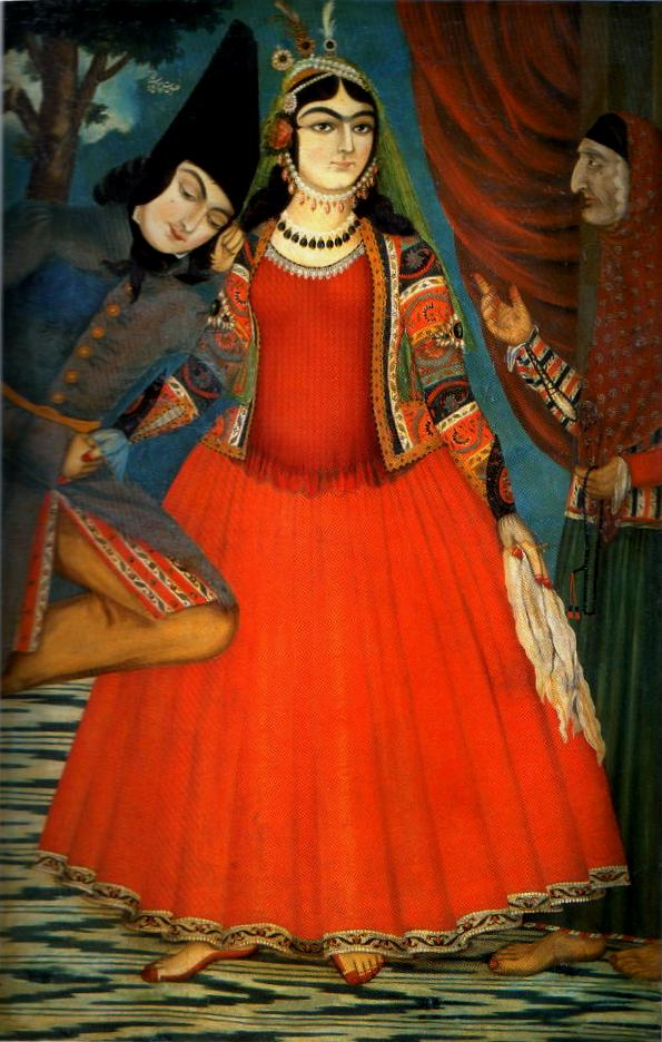 Двое юных влюбленных и парик_махерша. 1843 Гулистан